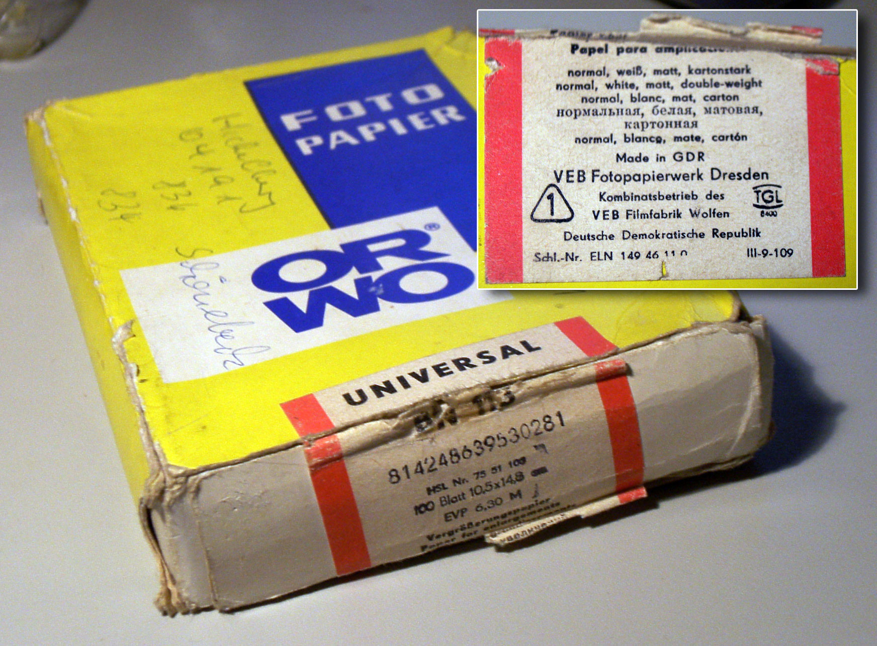 Fotopapierpackung ORWO